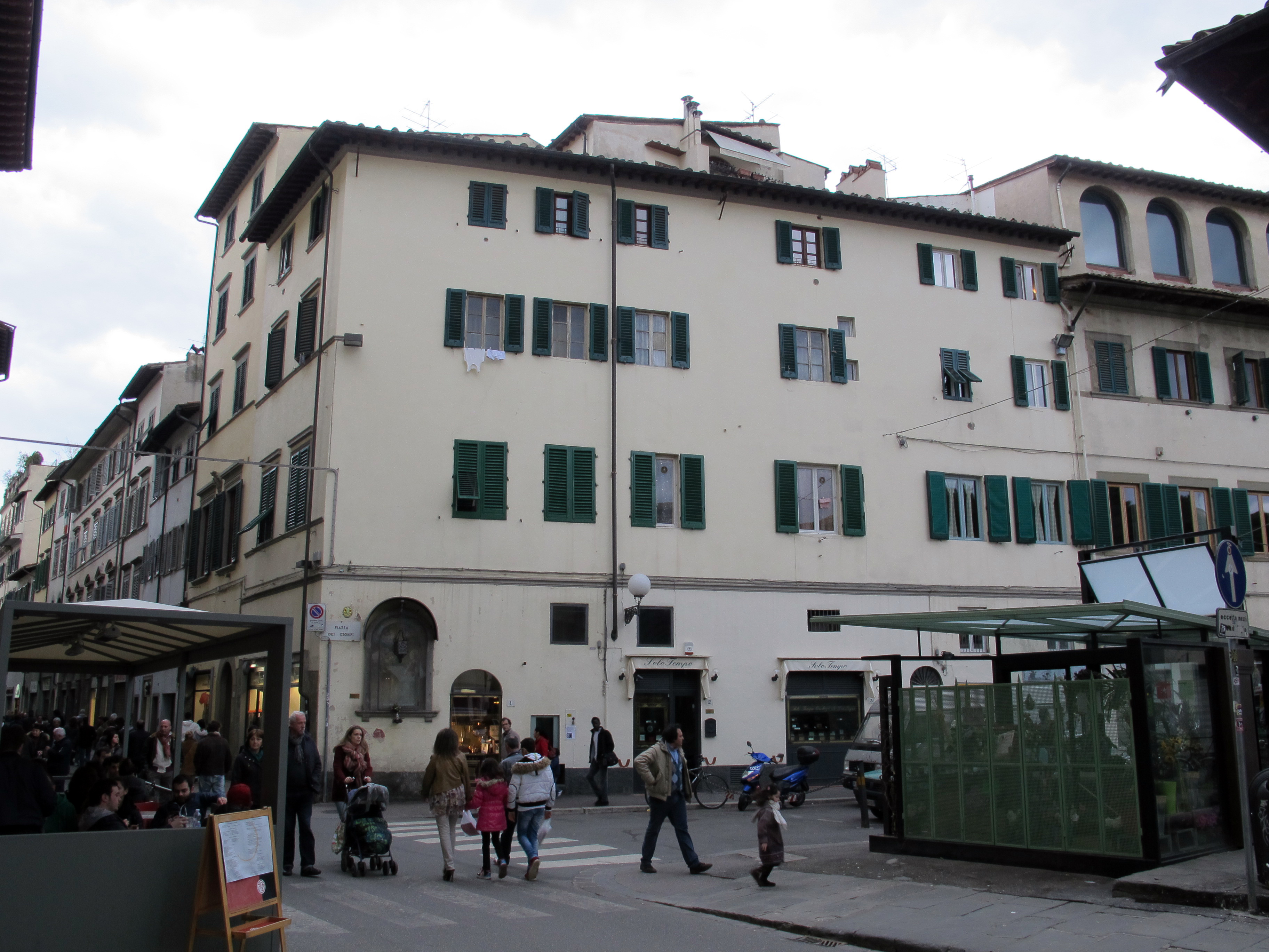 Piazza dei ciompi 1, casa con tabernacolo